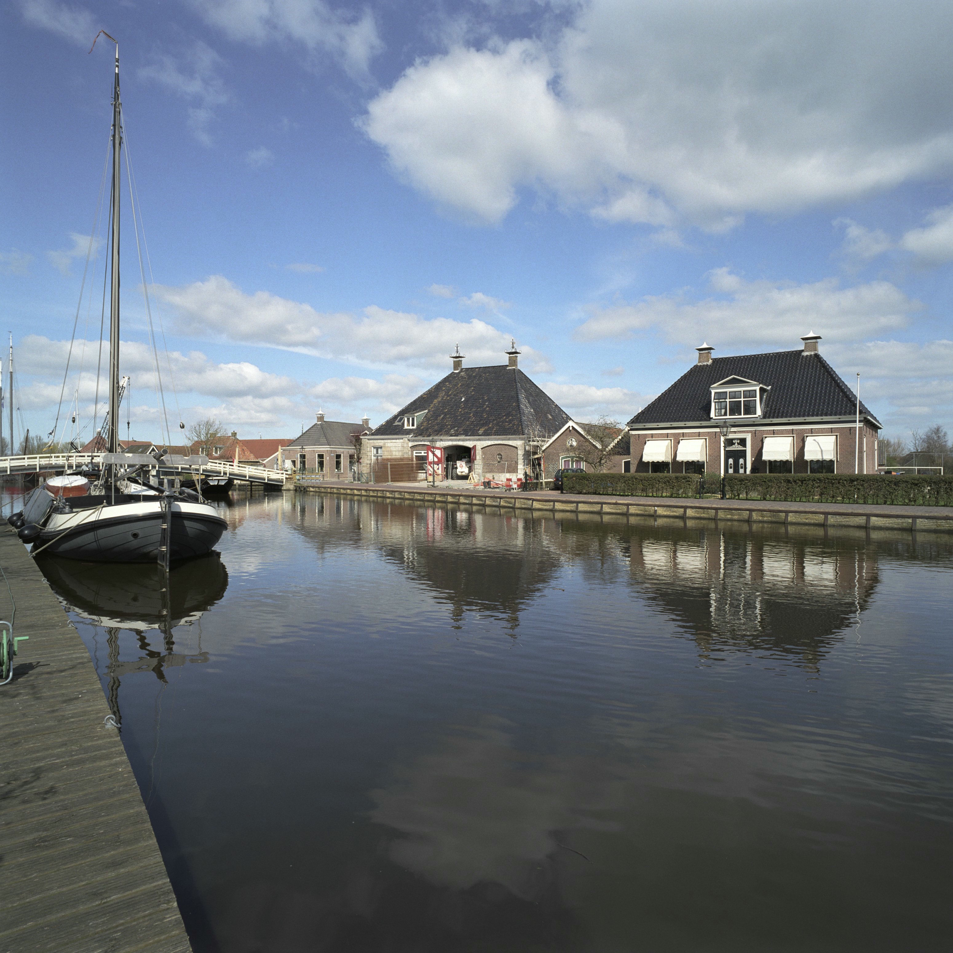 Boerderij Marsicht: Overzicht, met in het midden boerderij Marsicht, gezien vanaf de waterkant